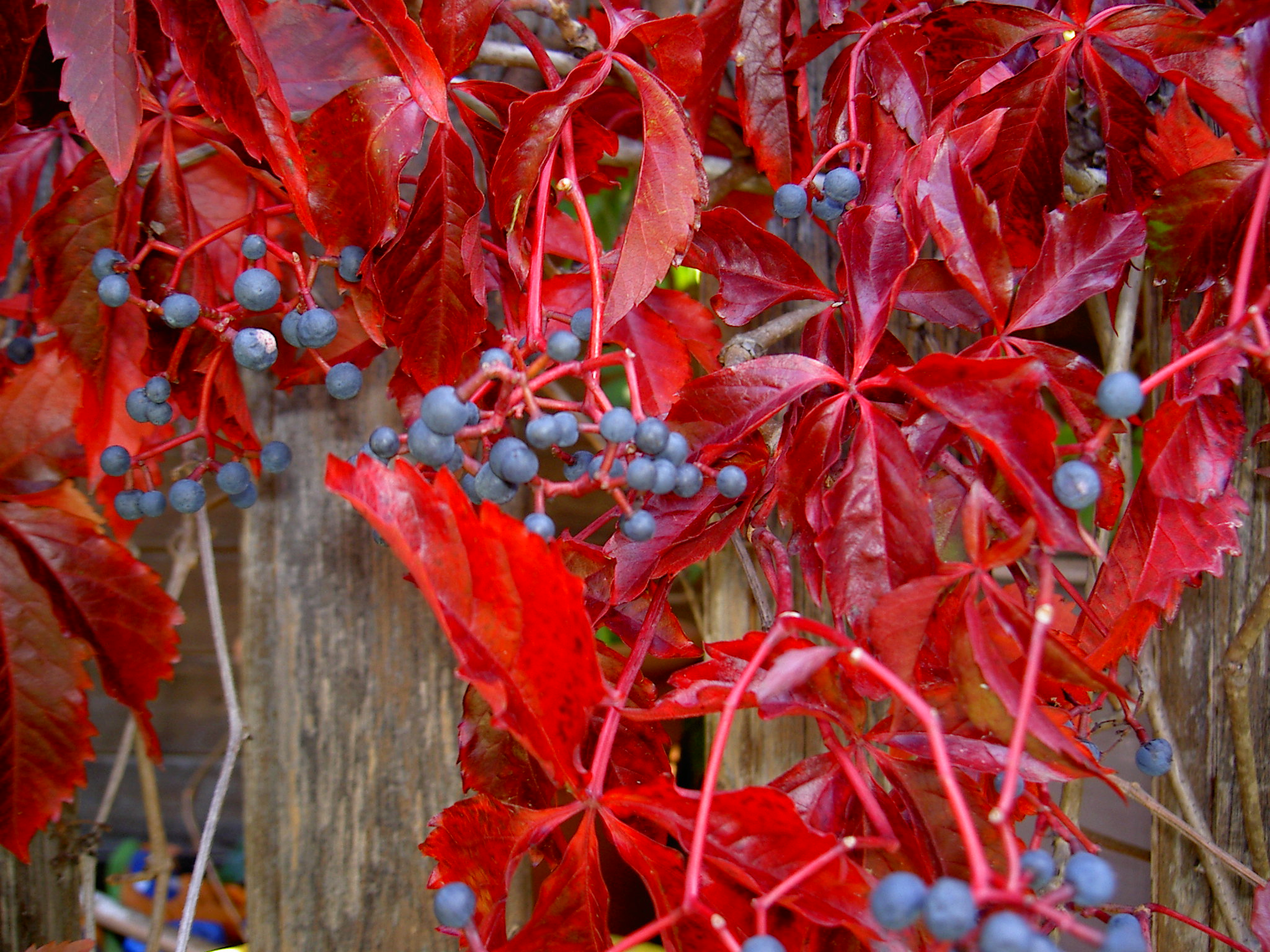 Wilder Wein mit Beeren, Steiermark; Parthenocissus quinquefolia